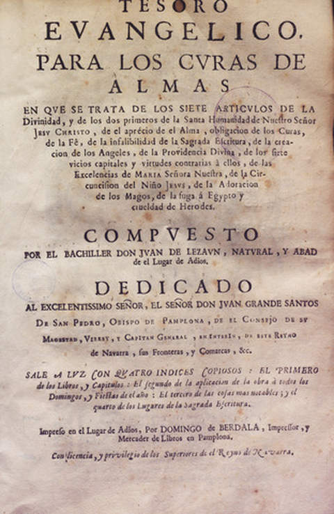 Juan de Lezaun, Tesoro evangélico, impreso por Domingo Berdala hacia 1692 en Adiós (Navarra)